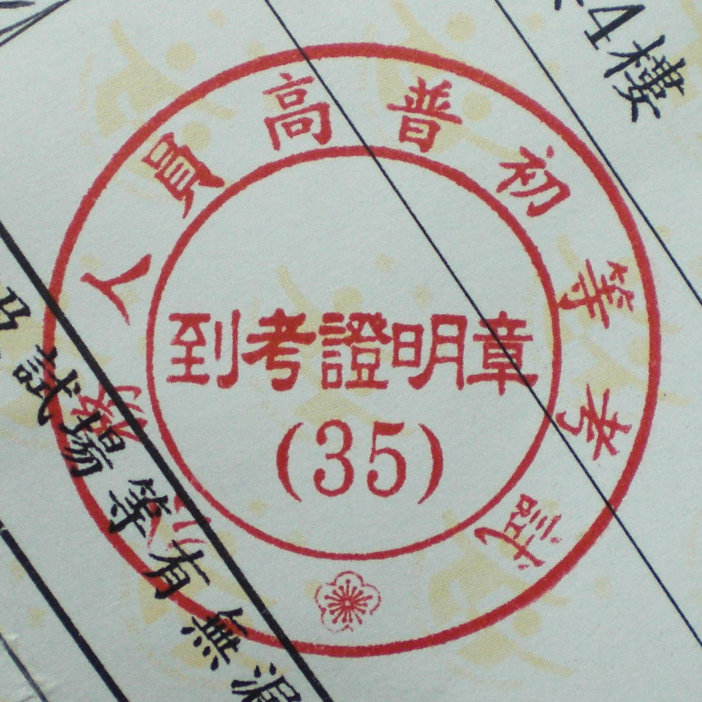 中文（台灣）: 中華民國102年公務人員高普初等考試到考證明章